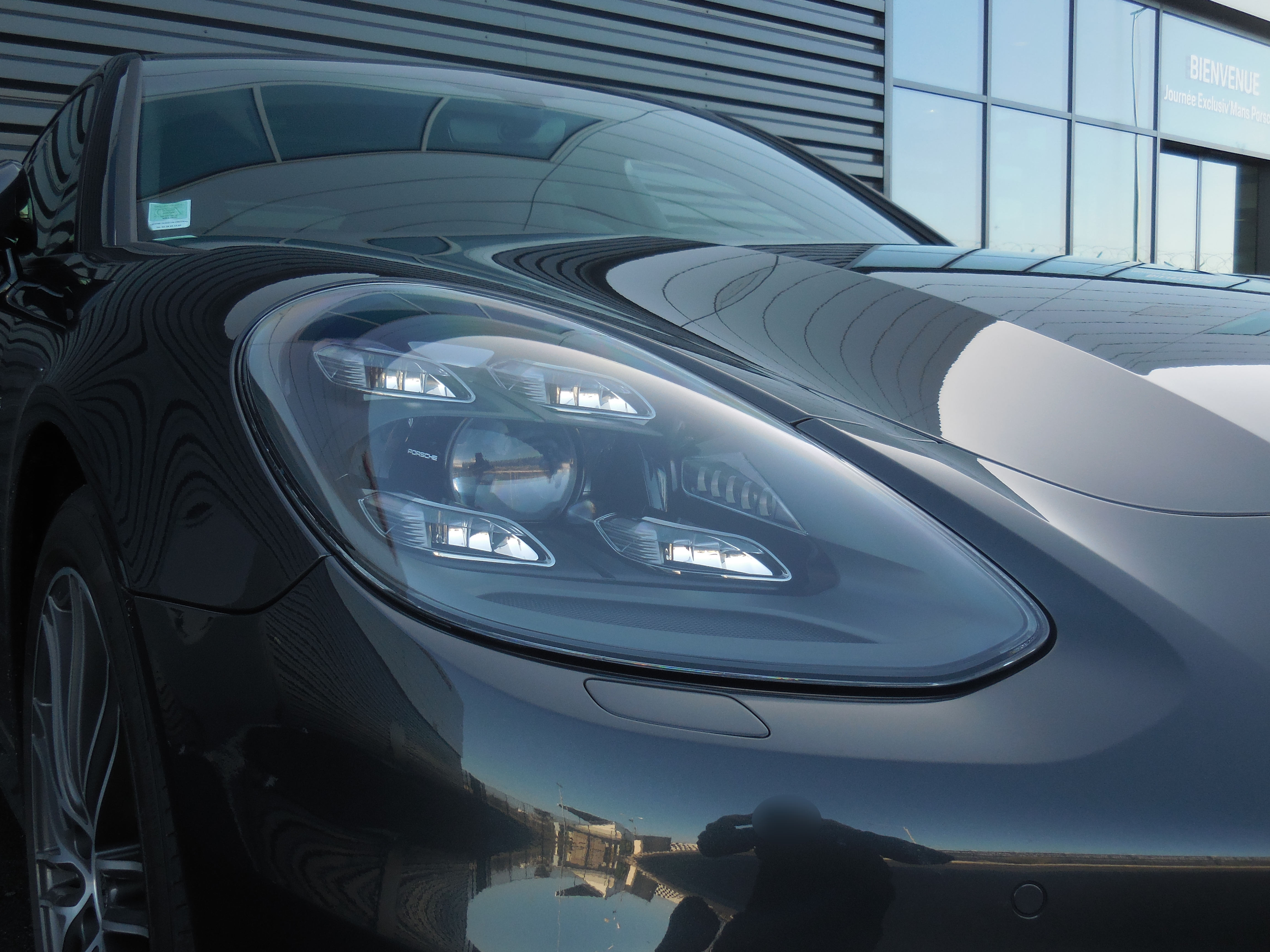 Porsche Panamera 4 E-Hybrid (2ème génération) - phares